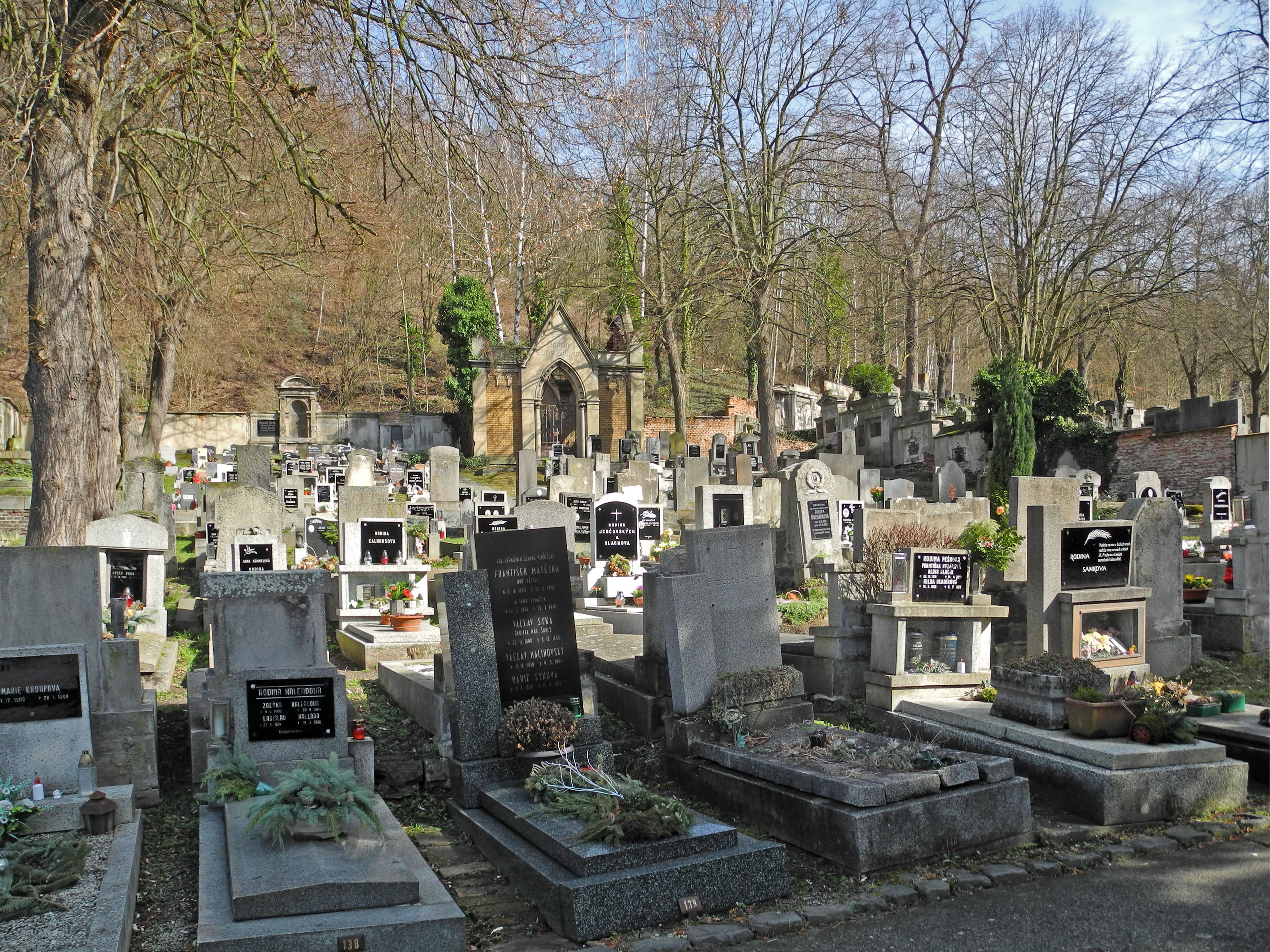 Friedhof in Aussig-Schönpriesen – Ústí nad Labem, Krásné Březno, Neštěmická